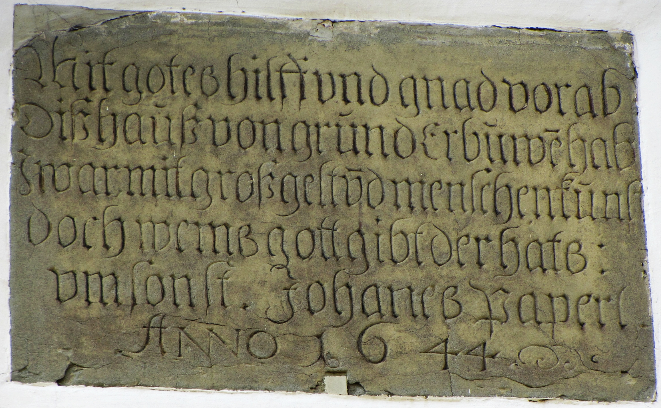 Bauinschrift an der Giebelfassade des Haggenschloessli